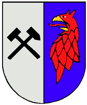 Wappen der Stadt Torgelow